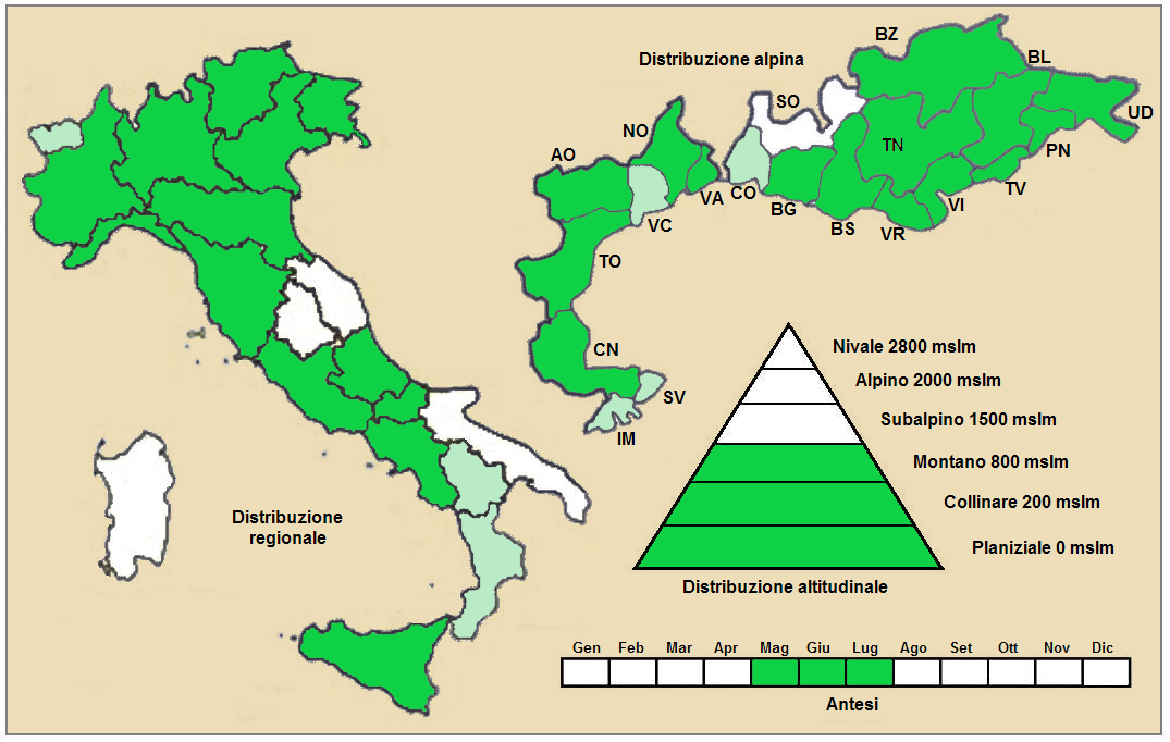 Forasacco di Beneken (Bromus benekenii) - Distribuzione in Italia